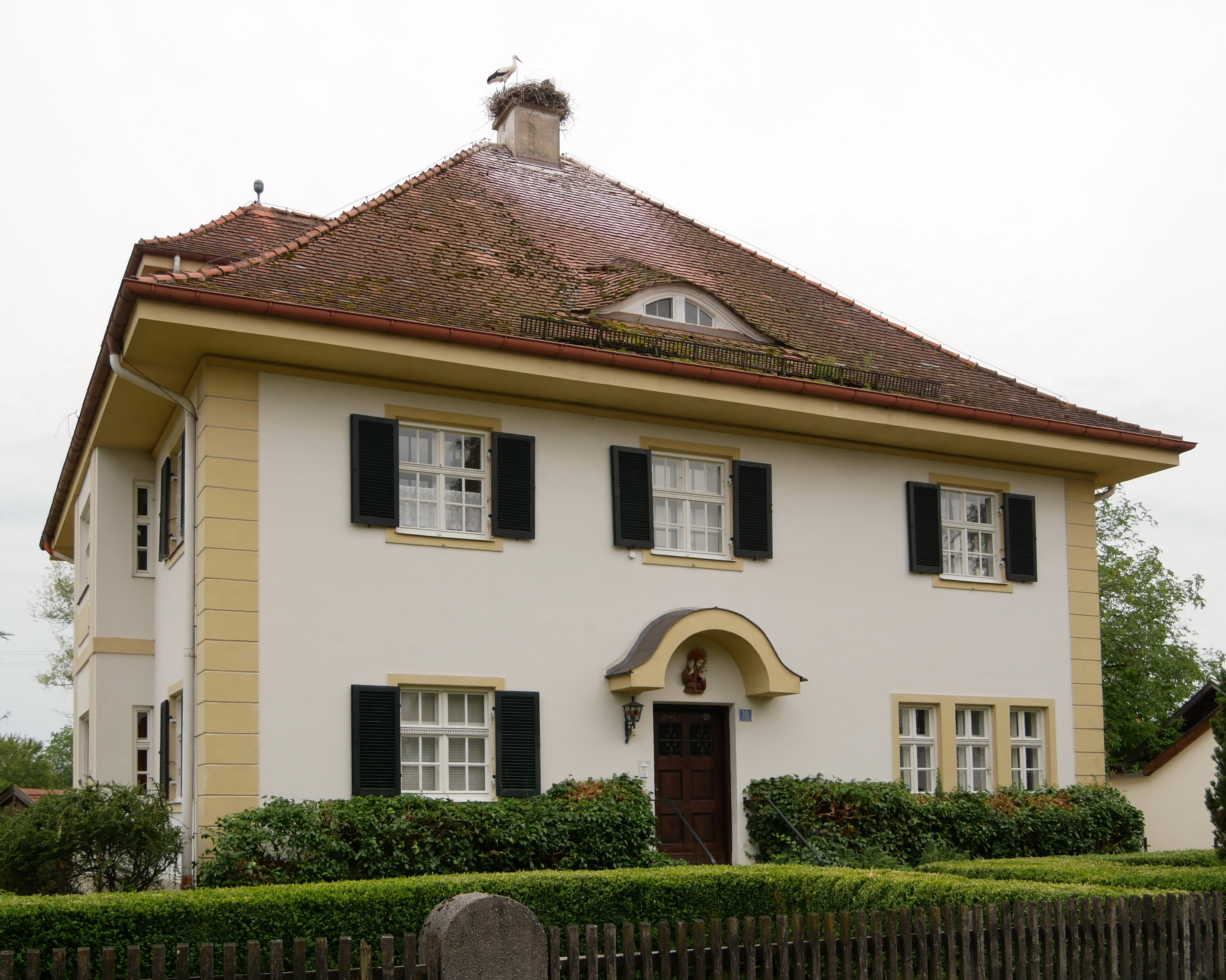 Raisting, Kirchenweg 10: Pfarrhaus, Ansicht von N